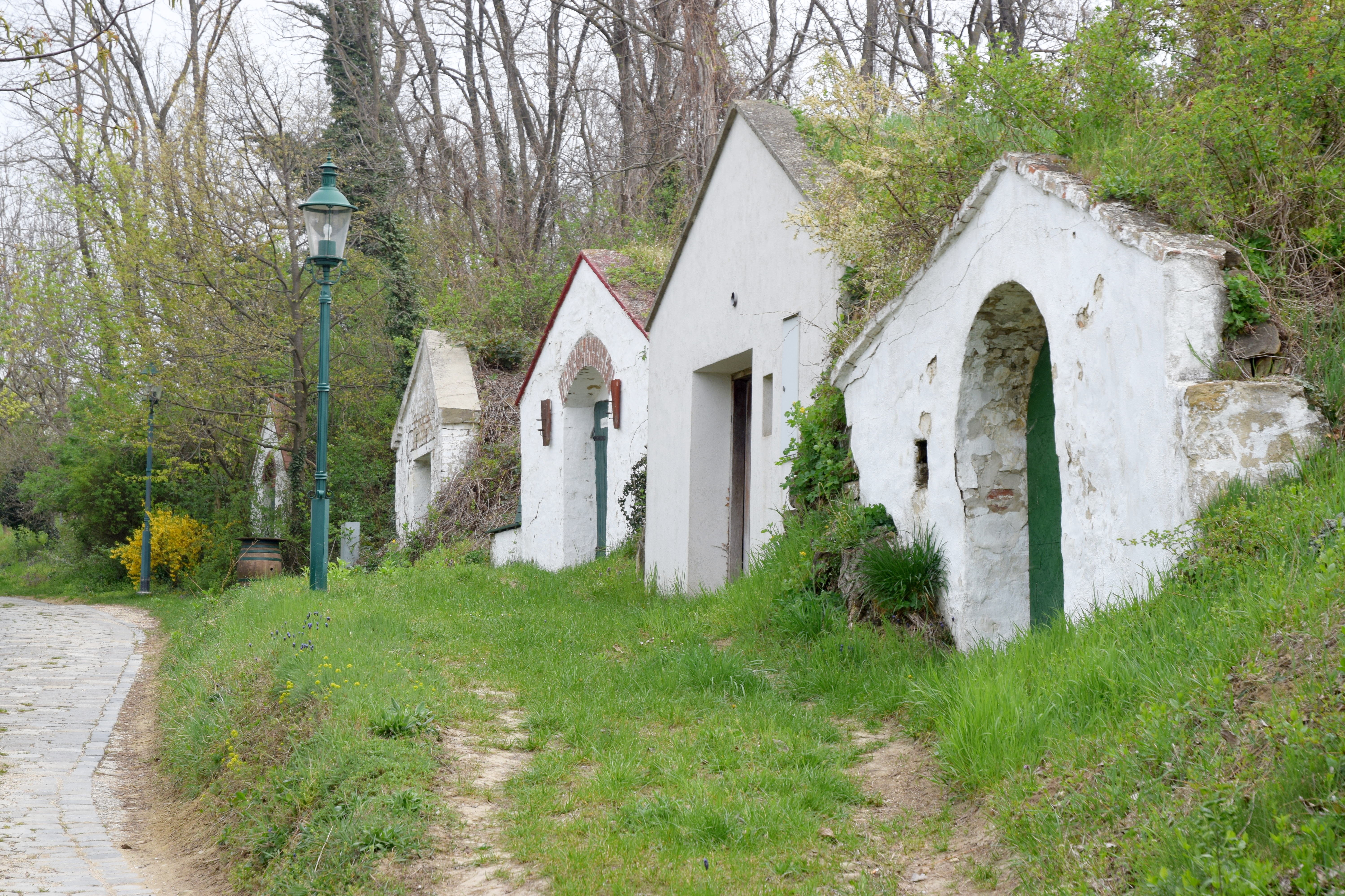 Kellergasse Hundsleiten in der KG Stetten (Niederösterreich) in Stetten (Niederösterreich)